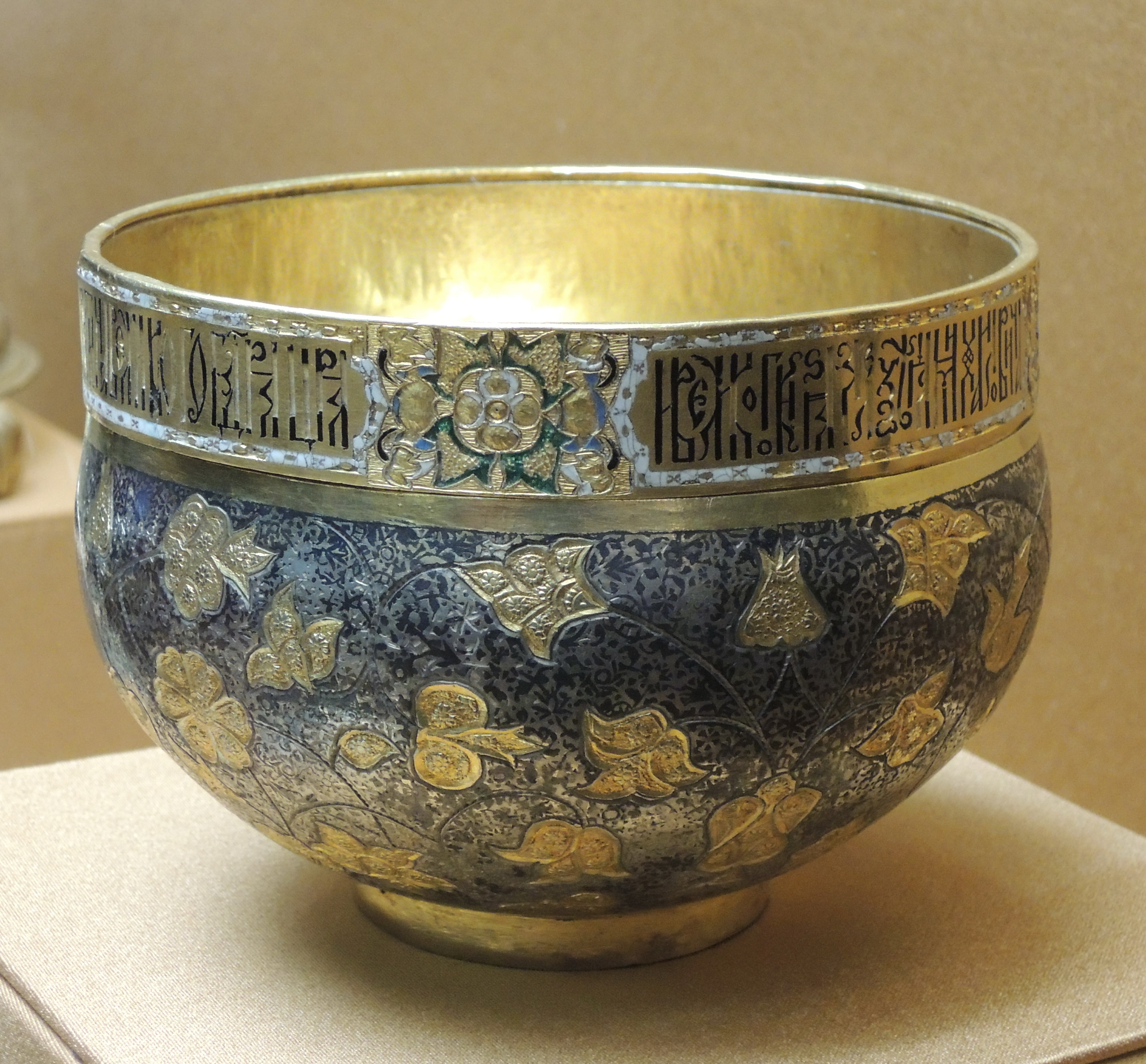 Братина царя Алексея Михайловича. Москва, мастерские Кремля, третья четверть XVII в. Серебро, золото. Чеканка, золочение, резьба, чернь, эмаль. Мастерские Московского Кремля,1654-1676 Серебро, золото Чеканка, золочение, резьба, чернь, эмаль Высота 8,8 см. Диаметр по венцу 11,3 см. Принадлежала царю Алексею Михайловичу Серебряная золоченая братина принадлежит к весьма немногочисленным сохранившимся образцам традиционной древнерусской посуды, выполненным для царя Алексея Михайловича. Ее тулово украшает мелкий черневой узор, среди которого свободно стелятся резные золоченые цветы и бутоны на тонких, изогнутых стеблях. По накладному золотому венцу идет черневая надпись о принадлежности сосуда царю Алексею Михайловичу и цветочный резной узор, заполненный белой, черной, прозрачной зеленой и голубой эмалью. года